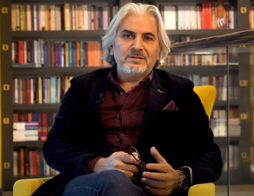 Kurdî: Firat cewerî